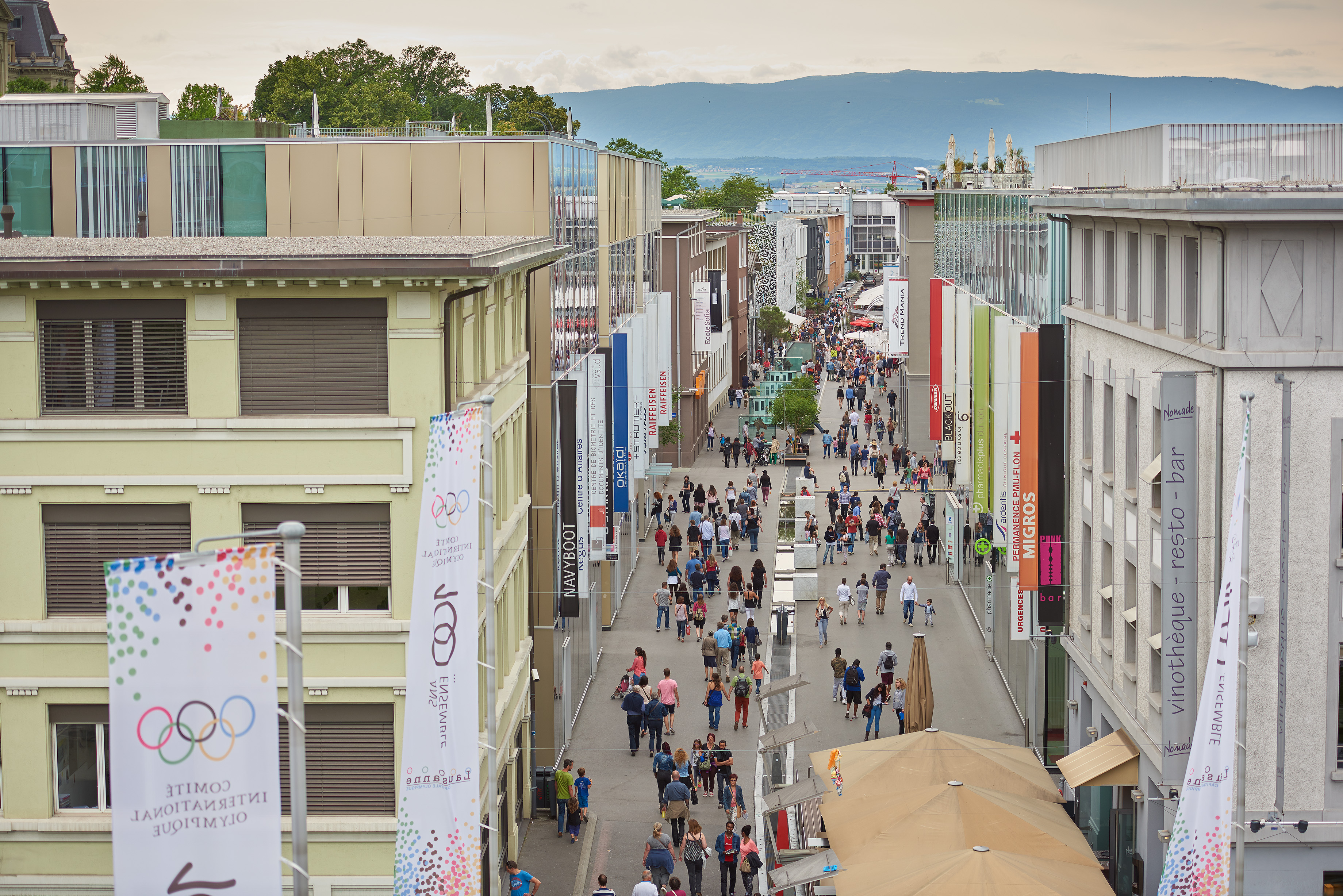 Voie-du-Chariot et piétons